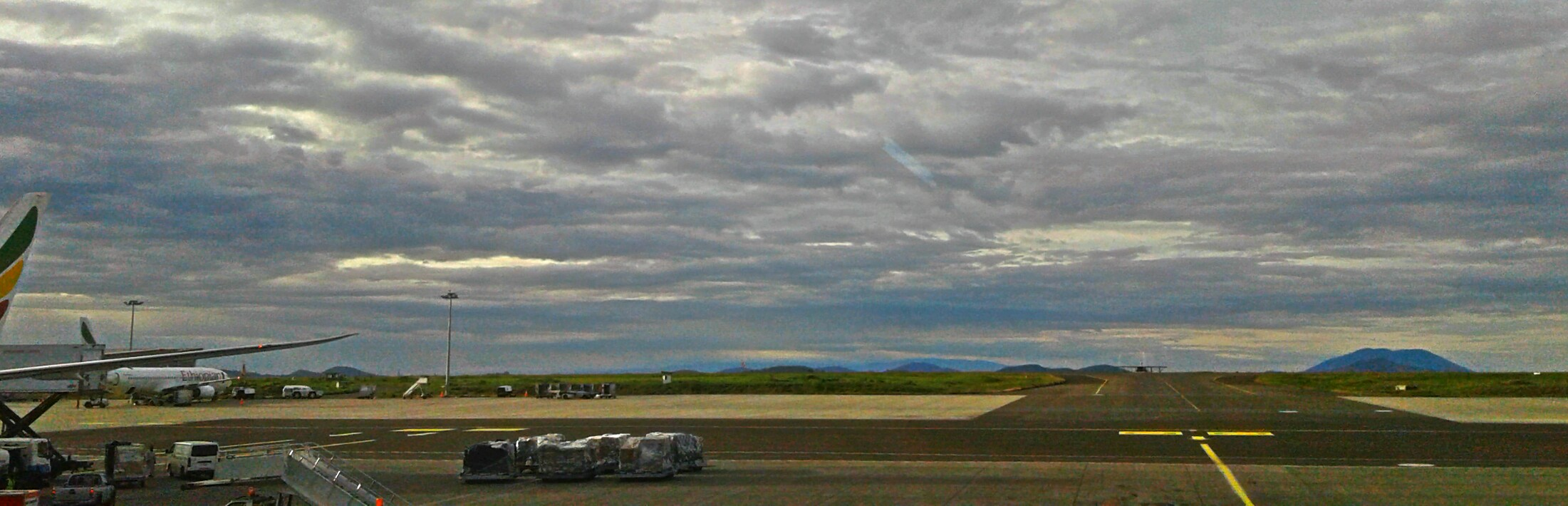 Una vista a la pista de aterrizaje del Aeropuerto Internacional Bole. Adís Abeba, Etiopía.